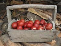 Panier d'oeufs